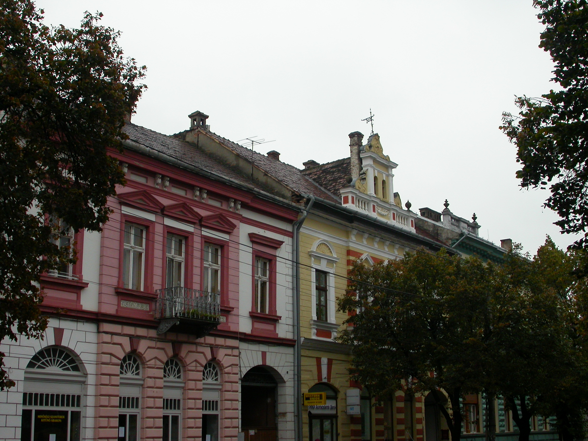 Ansamblul urban "Str. Kossuth Lajos" - strada comercială, sec. XVIII - XX